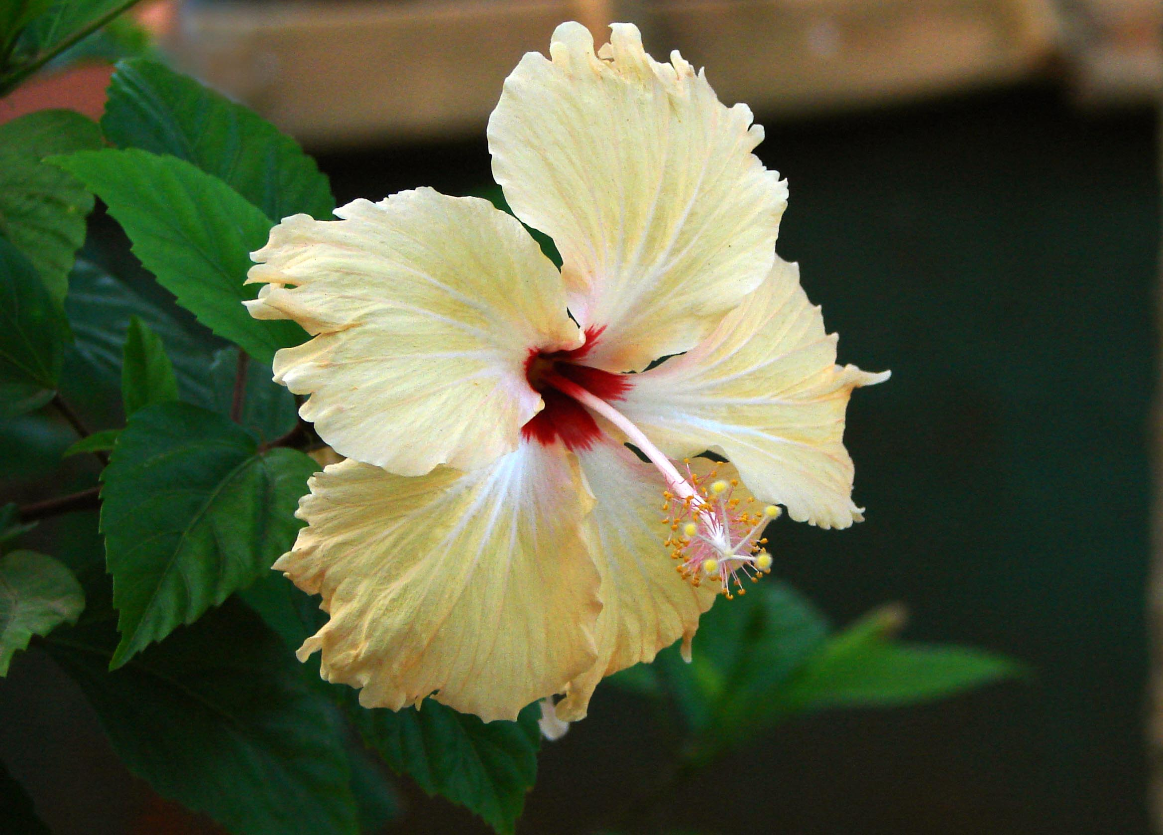 Hibiscus 'Mango Dainty'